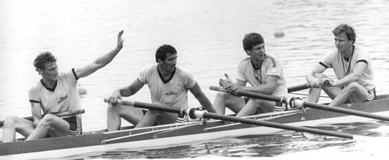 O. Förster, T. Bänsch, T. Greiner, H. Sennewald ADN-ZB Kluge 20.7.85 Brandenburg: DDR-Meisterschaften im Rudern- Mit dem Finale im Vierer ohne Steuermann begannen die Titelkämpfe auf dem Brandenburger Beetzsee. Die favorisierten Sieger der Rotsee-Regatta Olaf Förster, Thomas Bänsch, Thomas Greiner (alle SC Einheit Dresden) und Hans Sennewald (ASK Vorwärts Rostock-vlnr) gingen vom Start in Führung und gewannen das Rennen mit einer klaren Länge Vorsprung.